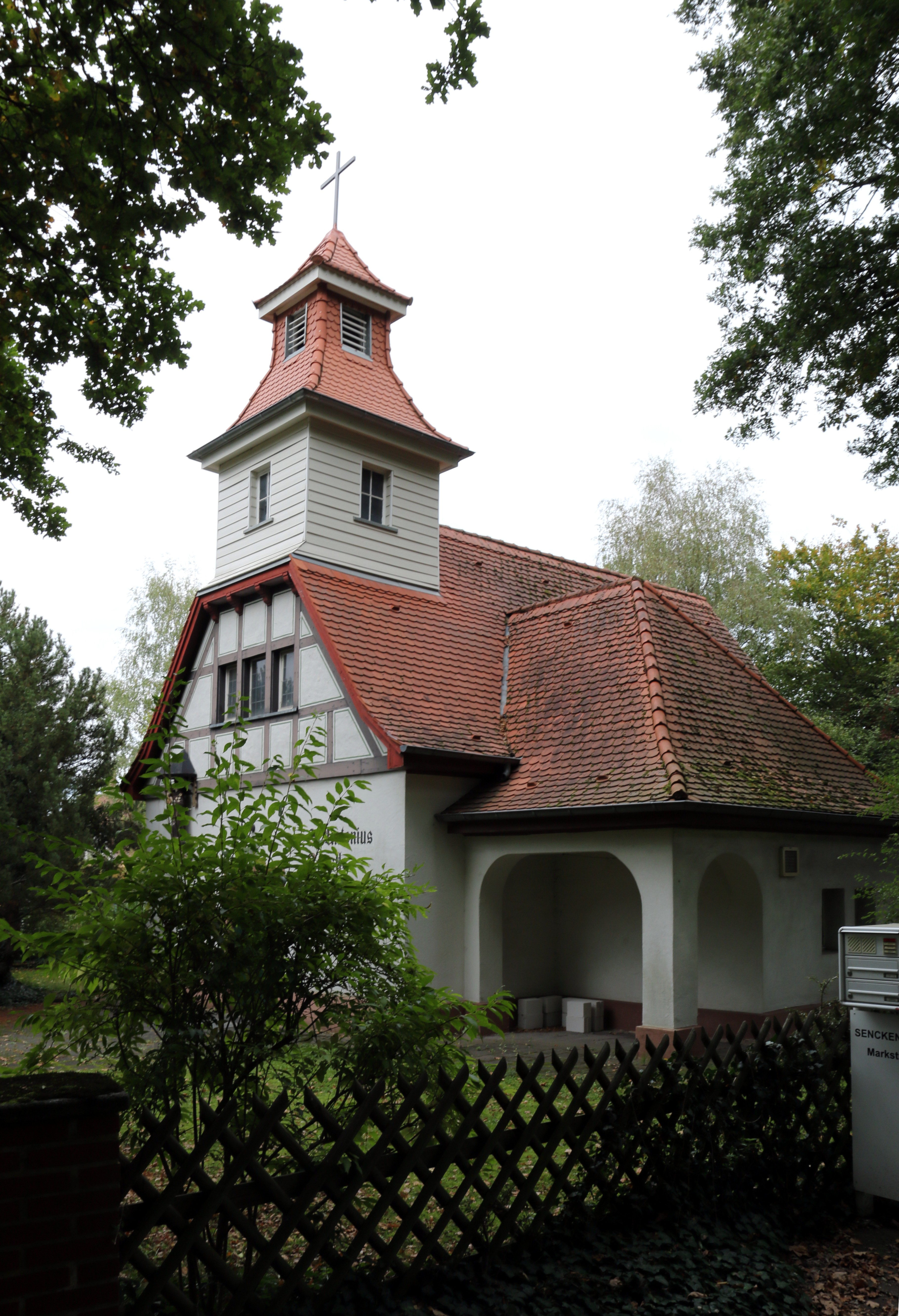 St. Antonius Kapelle in Grube Messel